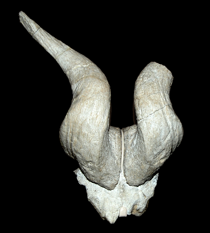 Naturhistorisches Museum Wien